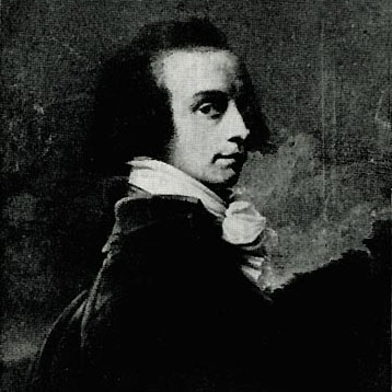 Gustav Ernst von Stackelberg, Venemaa diplomaat